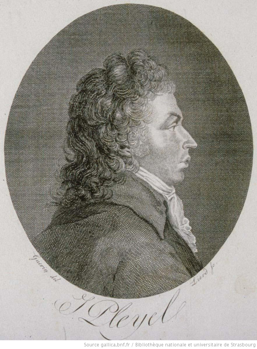 Ignace Pleyel. Buste par Guerin, 1801.